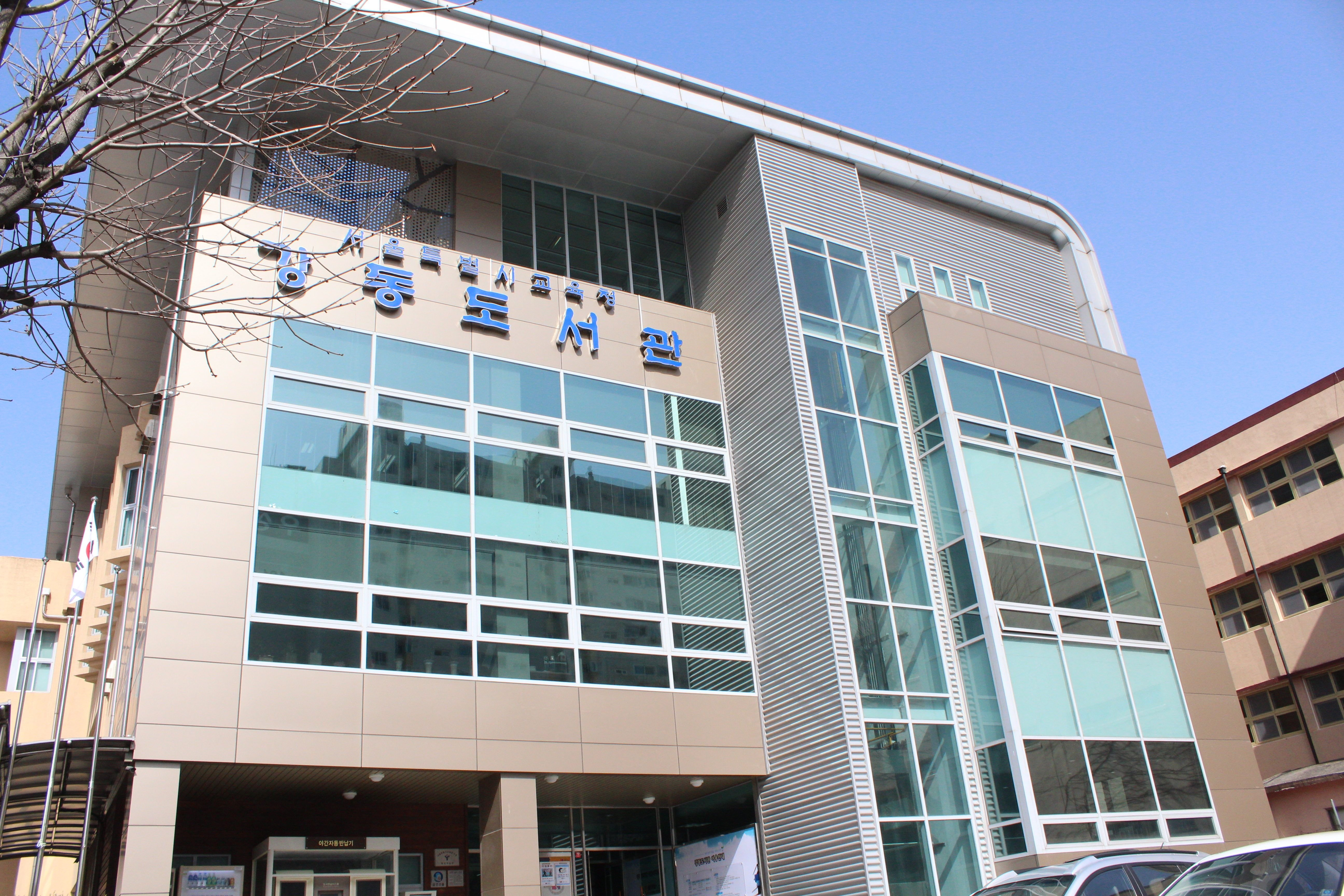 강동도서관 2010년 리모델링 이후 모습